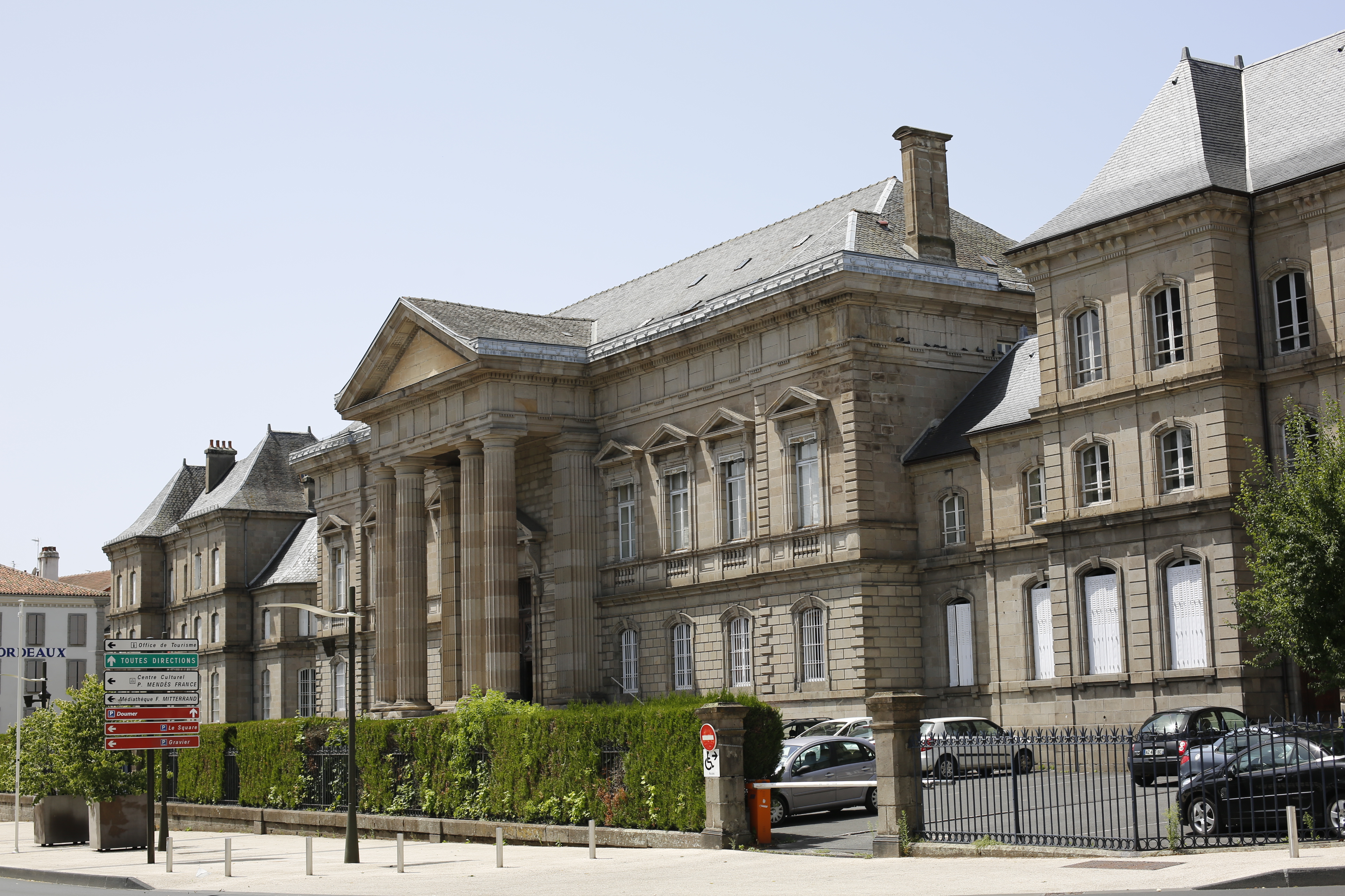 Palais de justice d'Aurillac. .